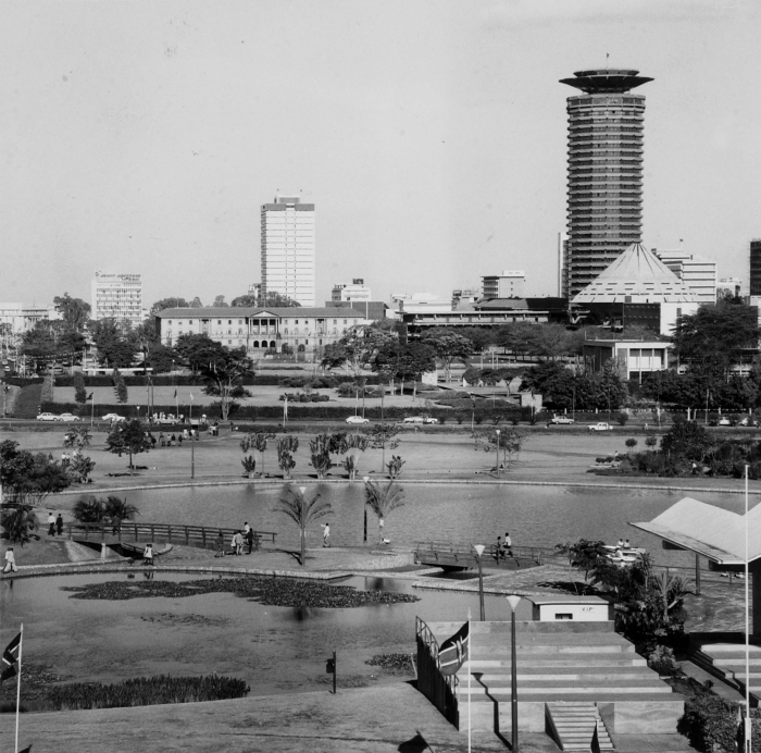 Op de achtergrond rechts het Kenyatta International Conference Centre en links het Hooggerechtshof, de 'Nairobi Law Courts'. De straten zijn met vlaggen versierd ter gelegenheid van tien jaar onafhankelijkheid van Kenya.